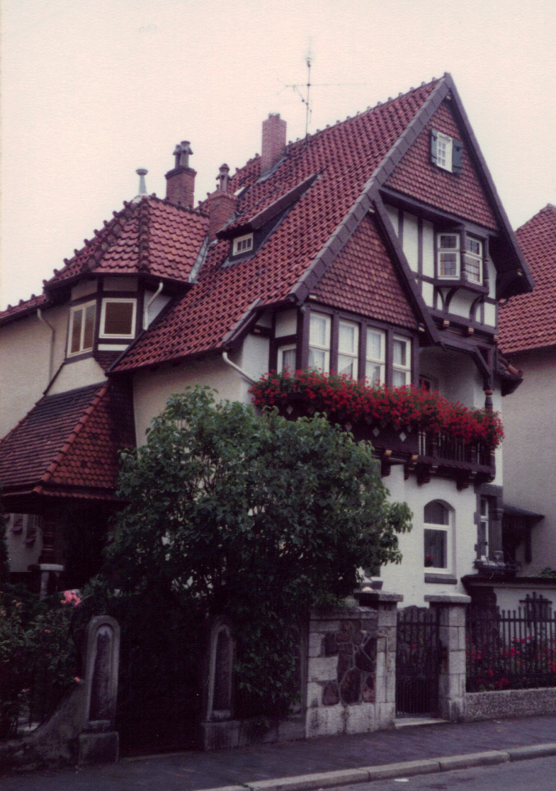 Häuser aus der Gründerzeit - typisch für die Hildesheimer Oststadt, hier am Krähenberg.